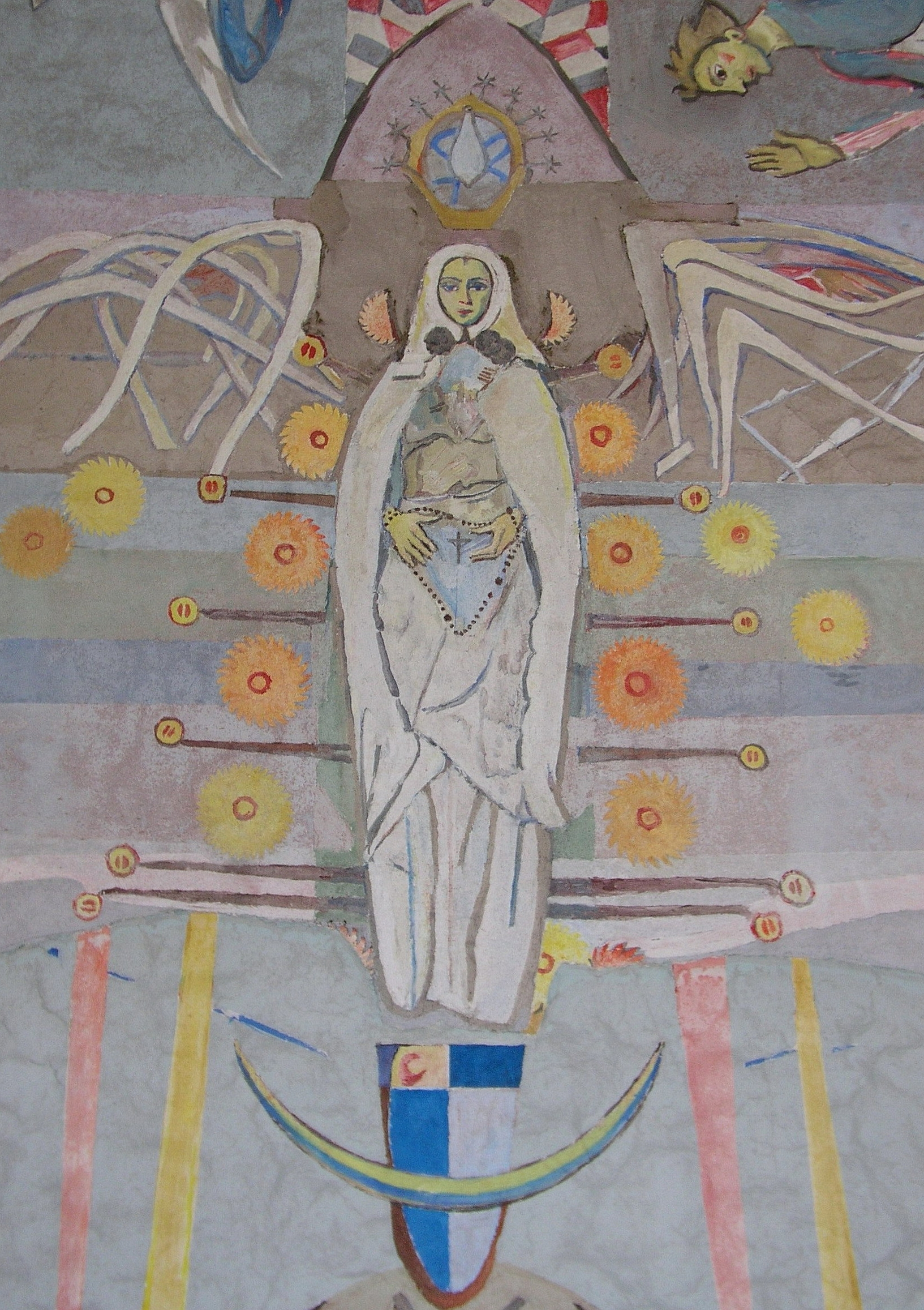 Basilika Seckau, Engelskapelle, Fresko "Seckauer Apokalypse" von Herbert Boeckl, 1952-1960: Die weiße Frau (der Glaube, die Kirche, Maria)